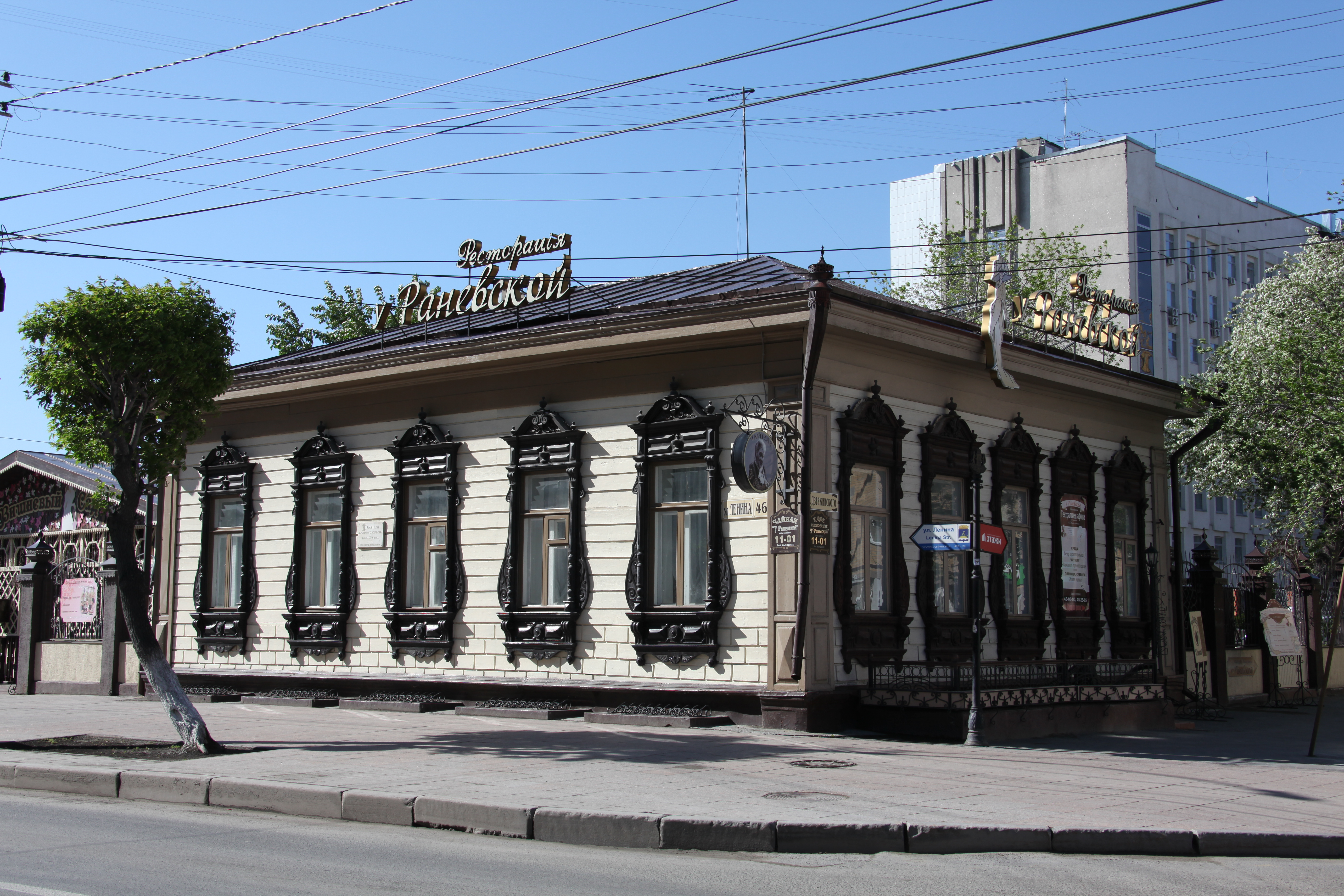 Ligna domo en strato Lenin 46. Tjumeno, Rusio.